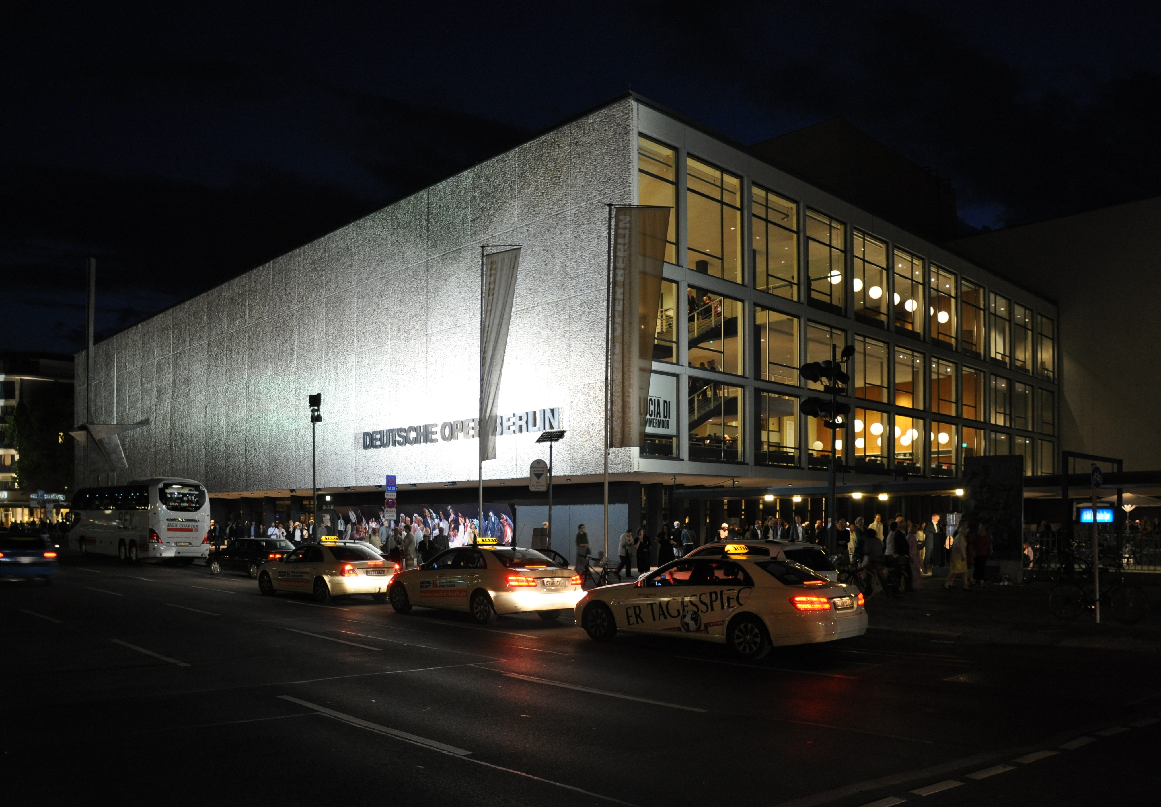 Berlin Deutsche Oper by night.jpg